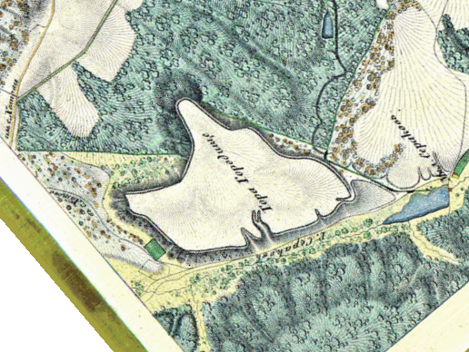 Хотівське городище скіфських часів під Києвом. Фрагмент карти штабу царської армії 1842 року.